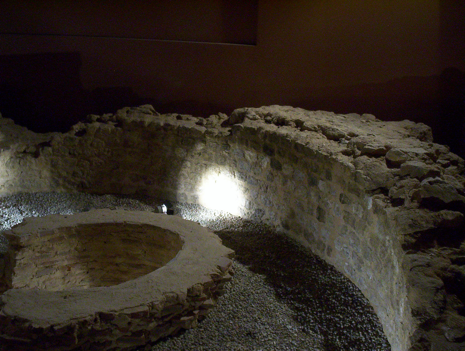 les vestiges d'un bain de Vindunum, datant du premier siècle après JC.